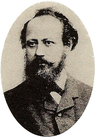 Foto de Anton Goering